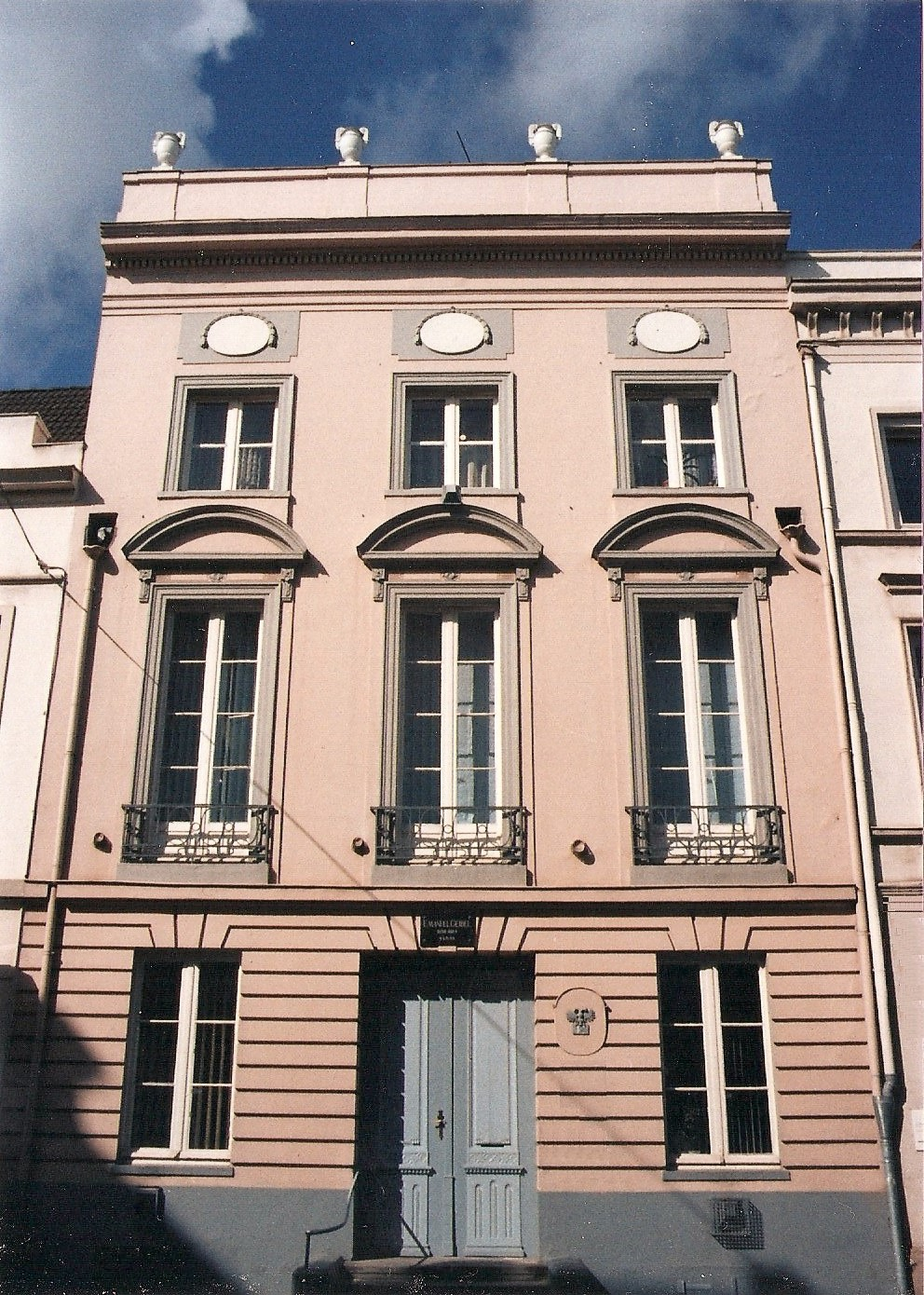 Lübeck letzte Wohnung von Emanuel Geibel